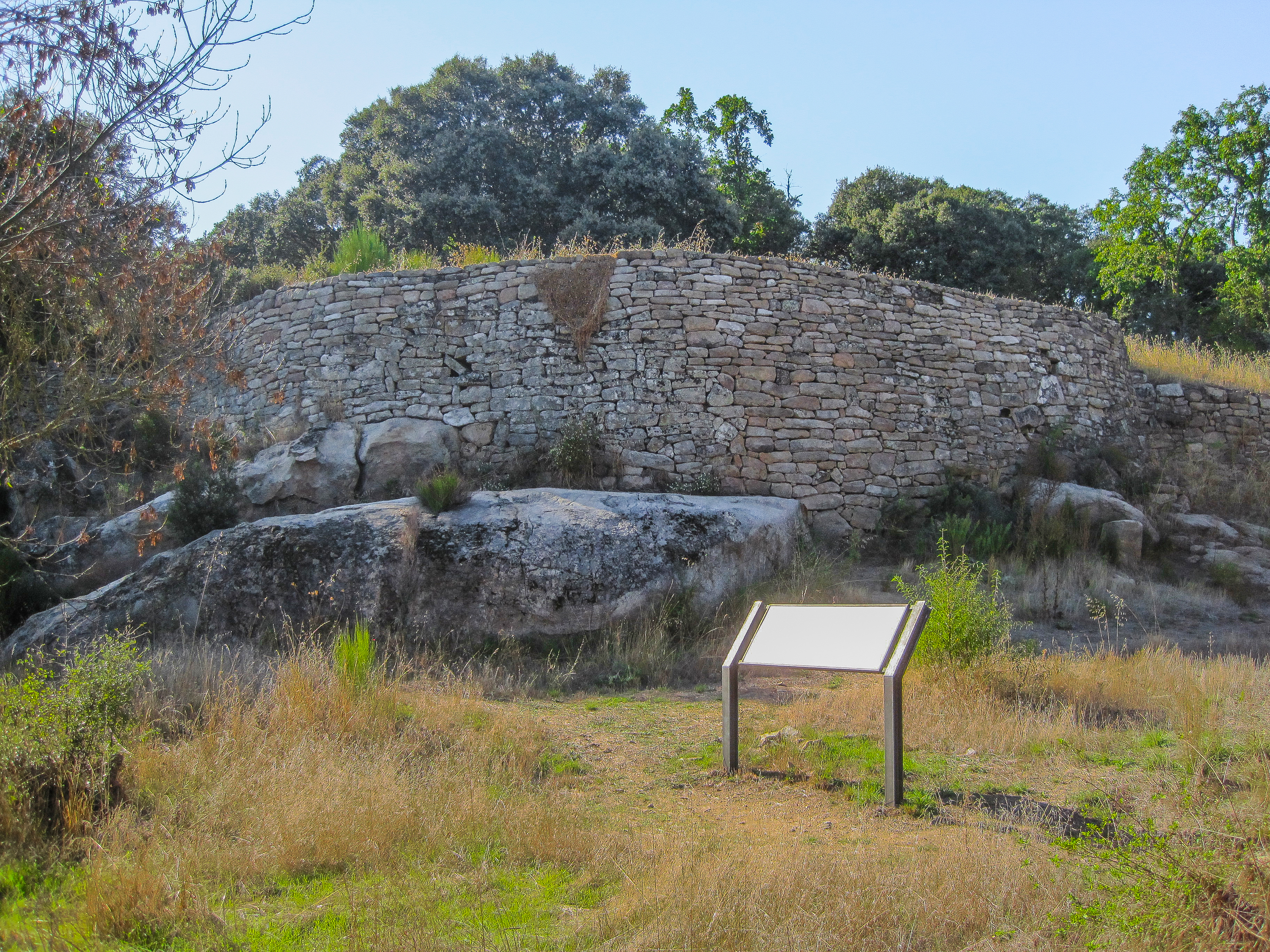 Uno de los lienzos de la muralla del Castro de las Merchanas (Lumbrales, Salamanca)